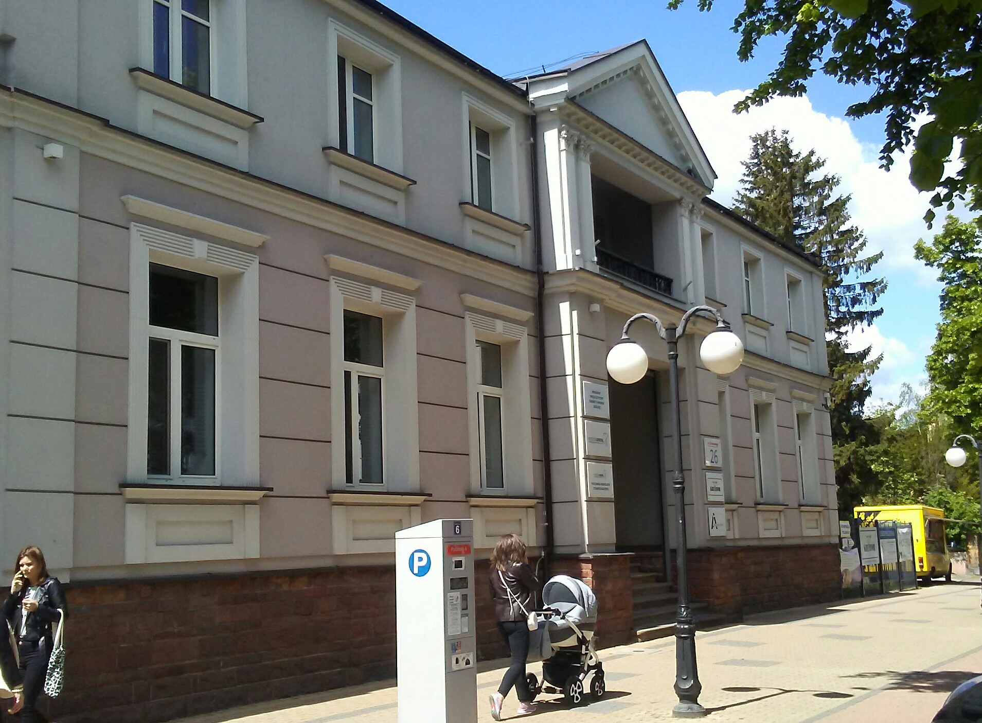 Koral Family palace in Tomaszów Mazowiecki, Saint Anthony Street 26